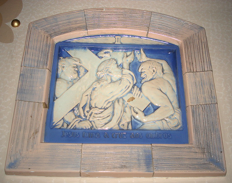 Interior da Igreja Nossa Senhora do Rosário, Porto Alegre, Brasil. Um dos passos da Via Sacra